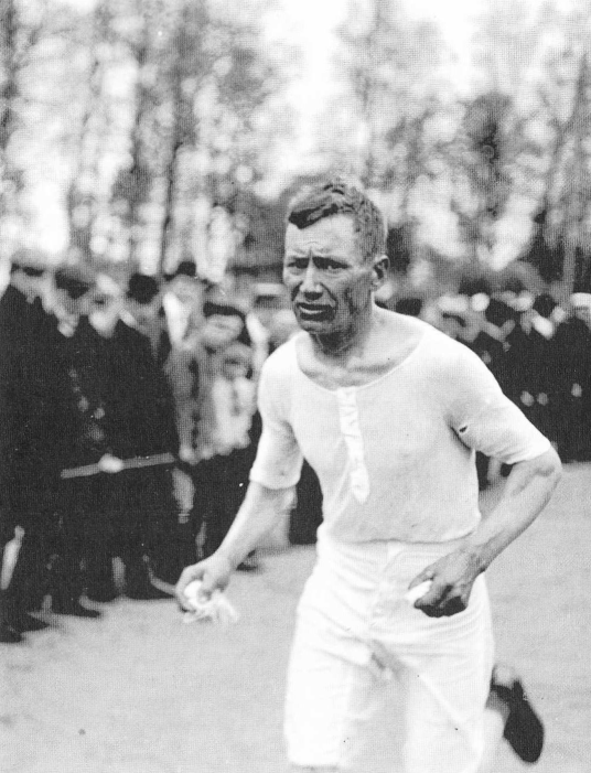 Kalle Nieminen, a Finnish long-distance runner, running a marathon in Kaisaniemi, Helsinki, summer 1909